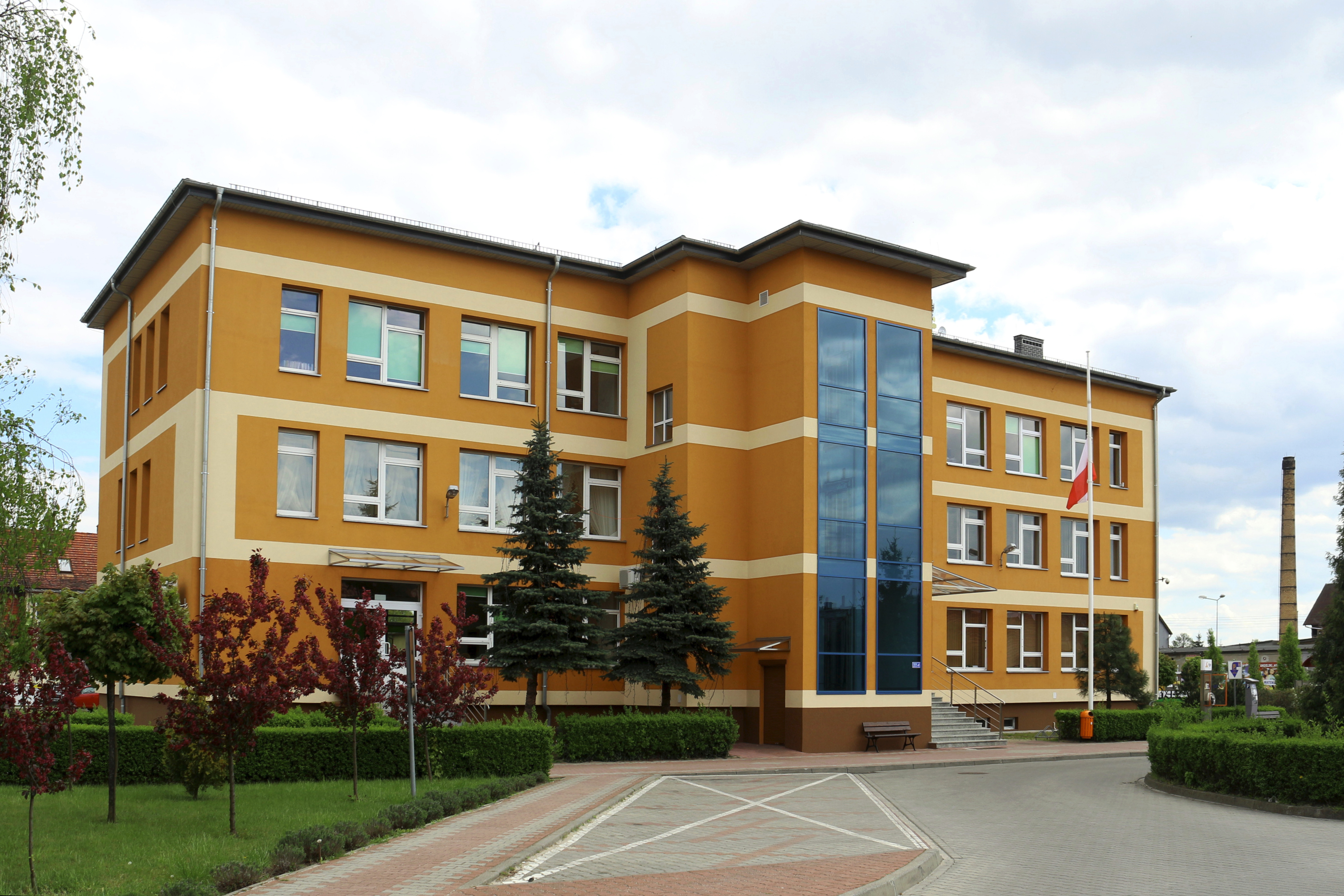 Sława, Urząd Miejski